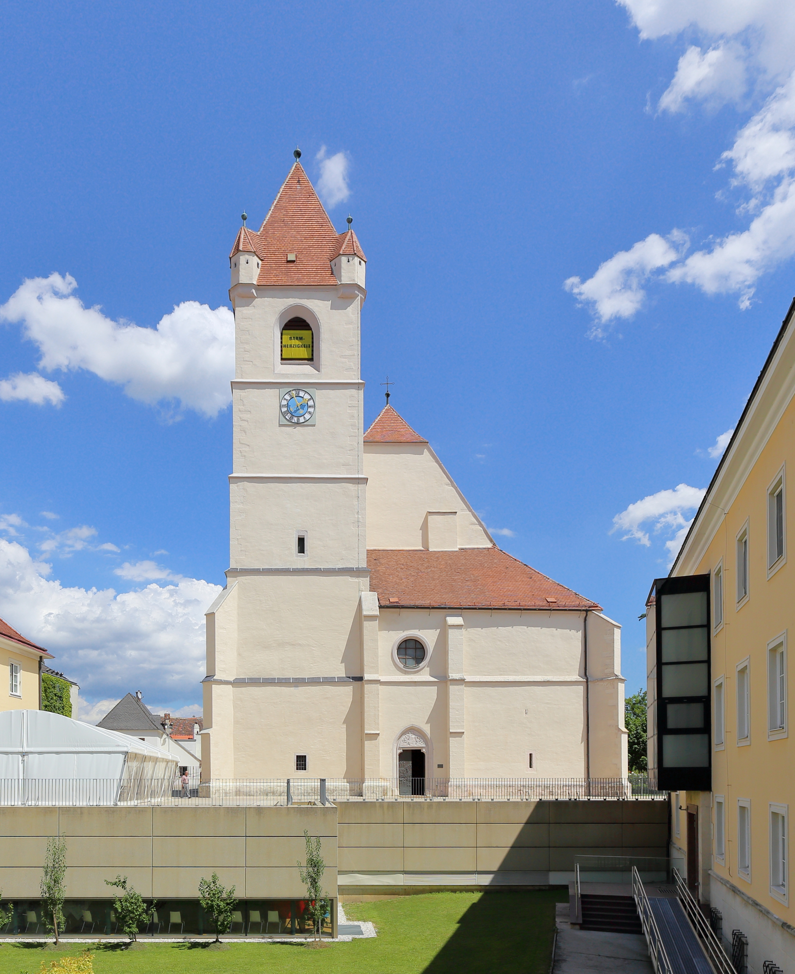 Westansicht des Domes St. Martin in der burgenländischen Landeshauptstadt Eisenstadt.Die dreischiffige spätgotische Hallenkirche wurde anstelle einer romanischen Kleinkirche errichtet. Um 1460 erfolgte der Neubau unter Johann Sybenhirter; 1468 war der Chor fertiggestellt und 1522 das Langhaus mit dem Turm. 1960 erfolgte die Erhebung der Stadtpfarrkirche zum Bischofsdom.Ursprünglich war westseitig eine Doppelturmfassade geplant, jedoch ausgeführt wurde nur der nordseitige und südseitig wurde der Turm nur bis auf eine Höhe von etwa des Langhauses realisiert.